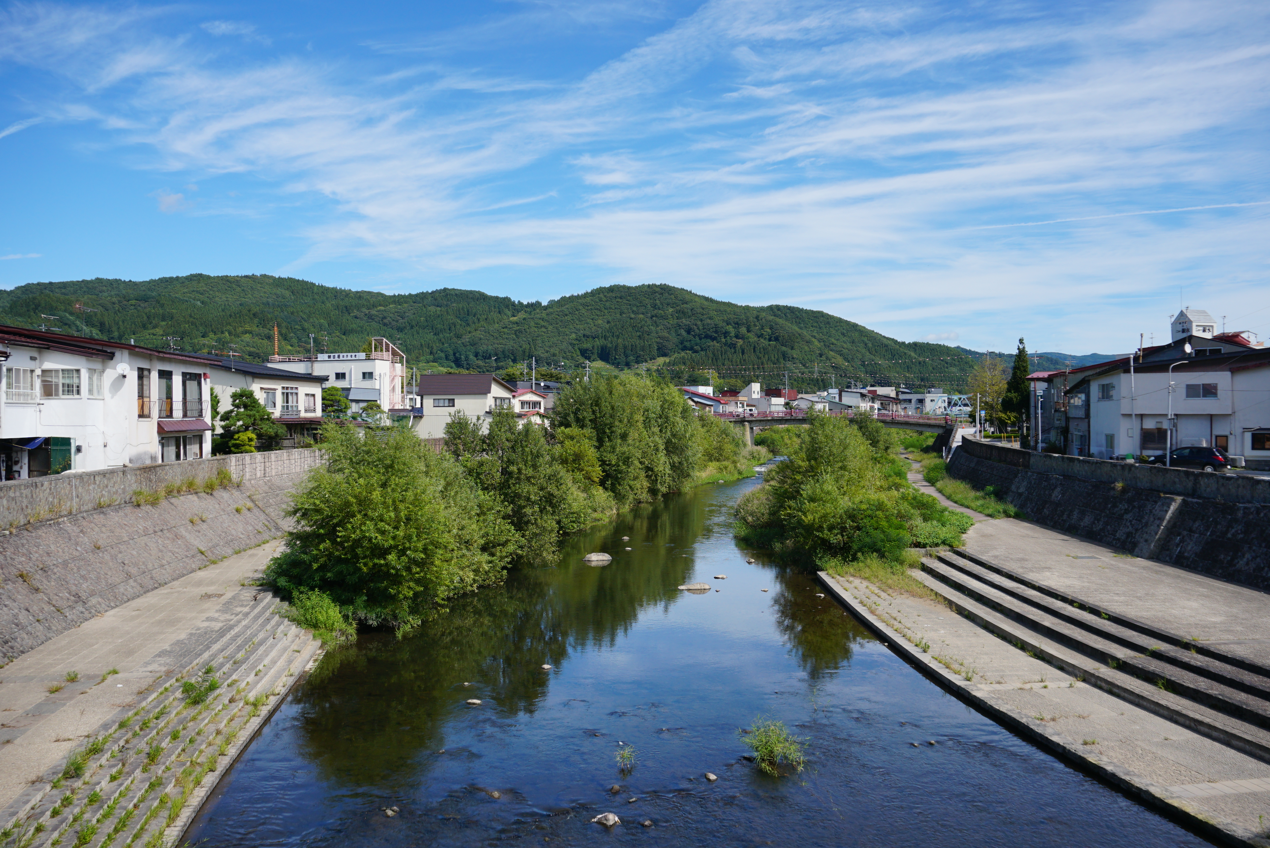 青森県大鰐町、月見橋より平川を眺める